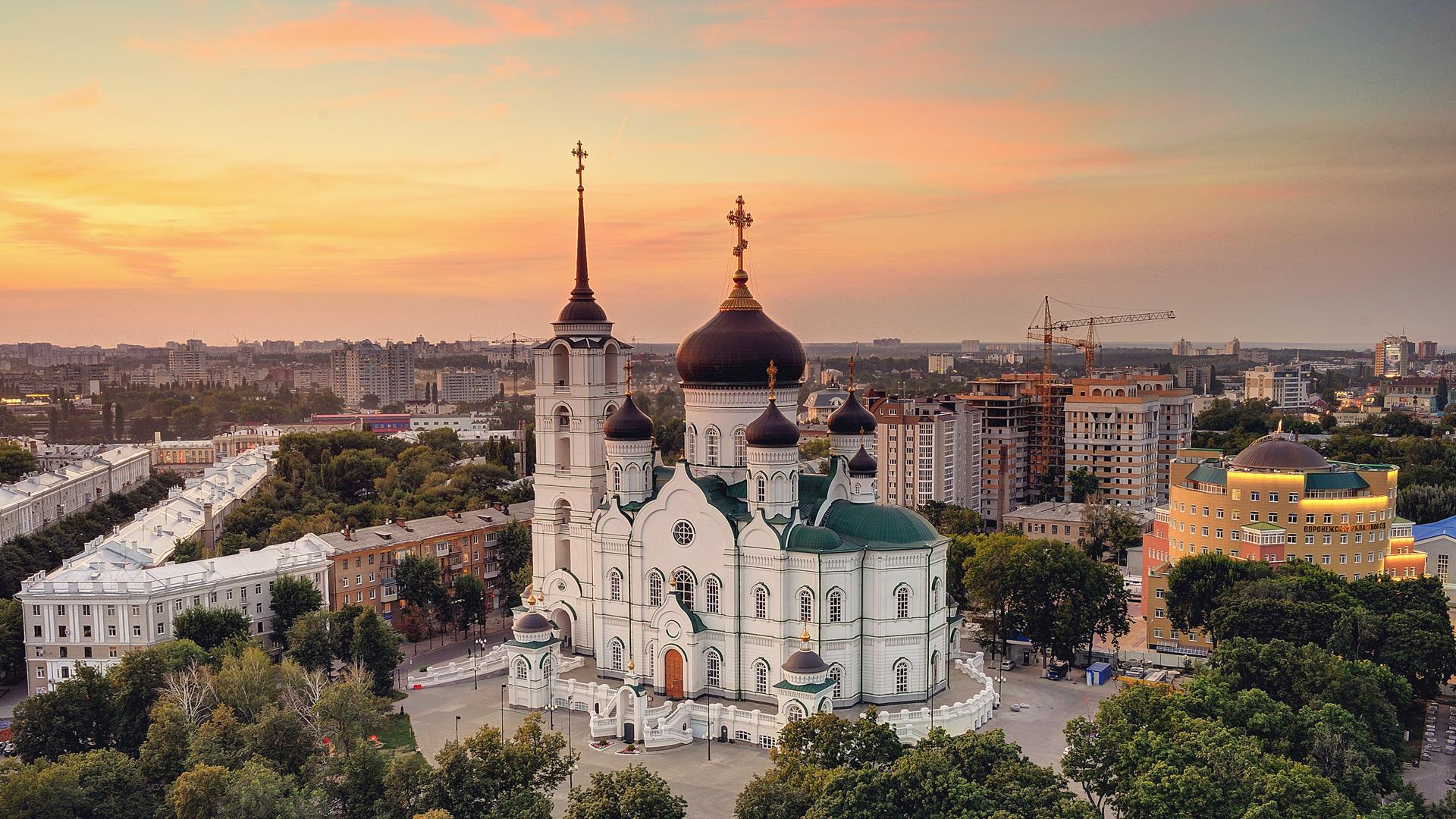 Благовещенский кафедральный собор (вид с башни ЮВЖД).